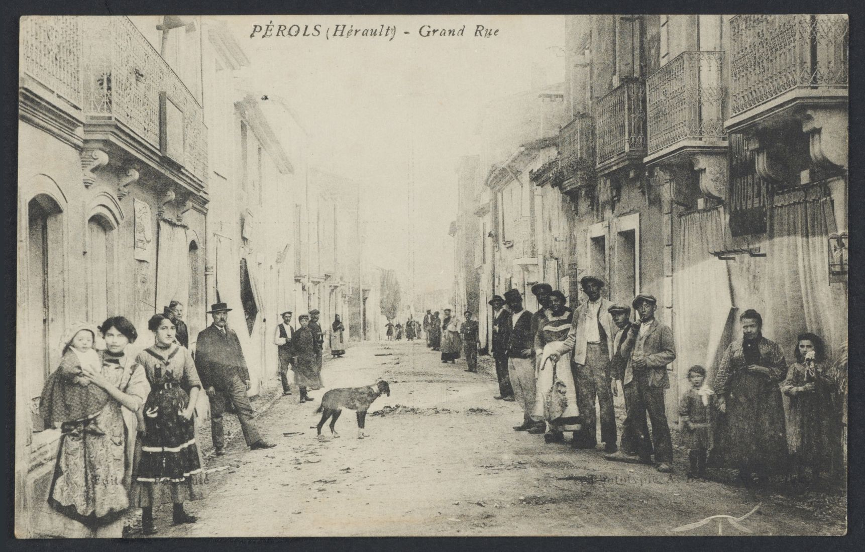 Pérols. - Grand Rue : carte postale.